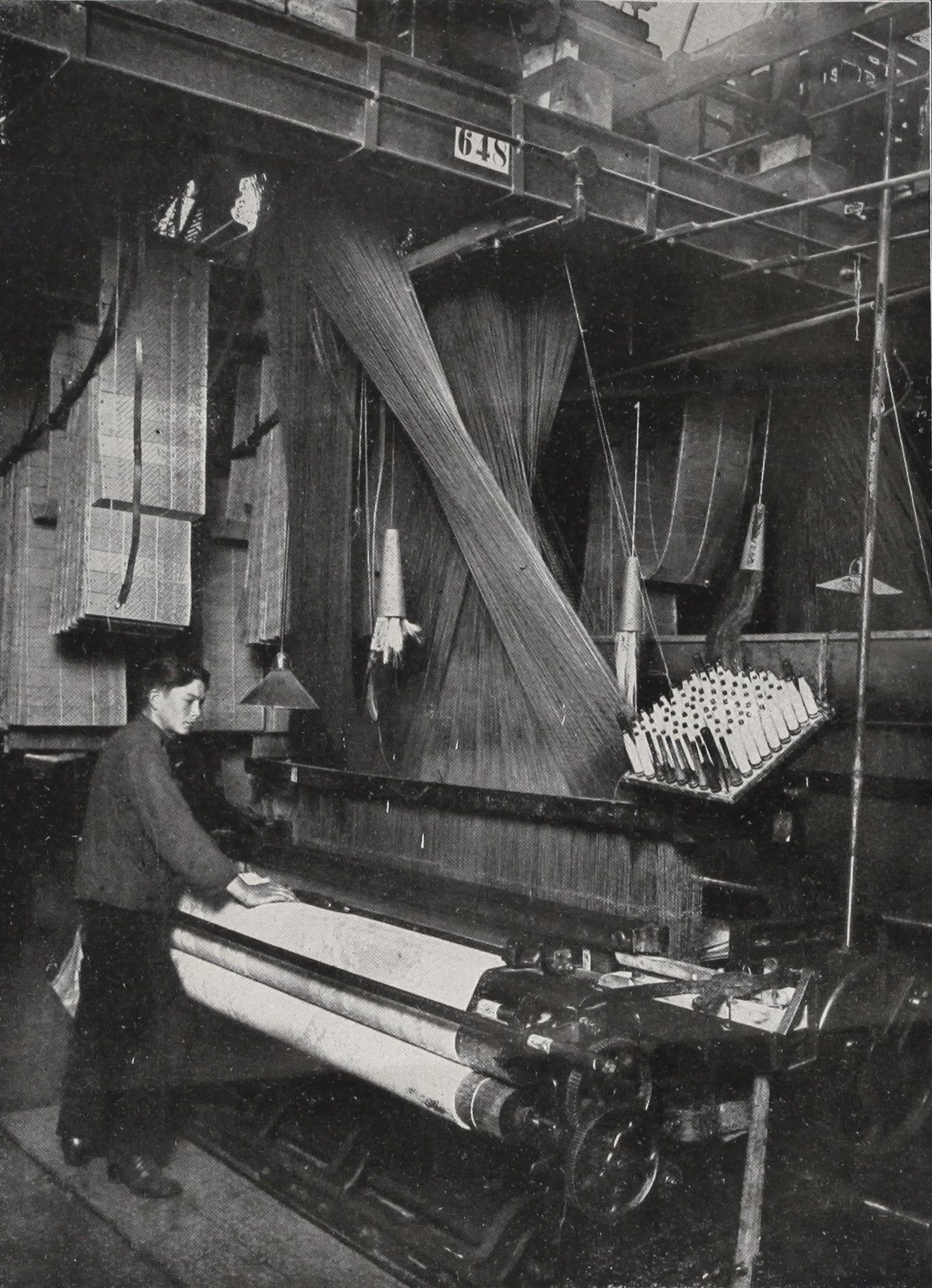 ZPB "Frotex" w Prudniku (dawniej "S. Fränkel"), 1932.